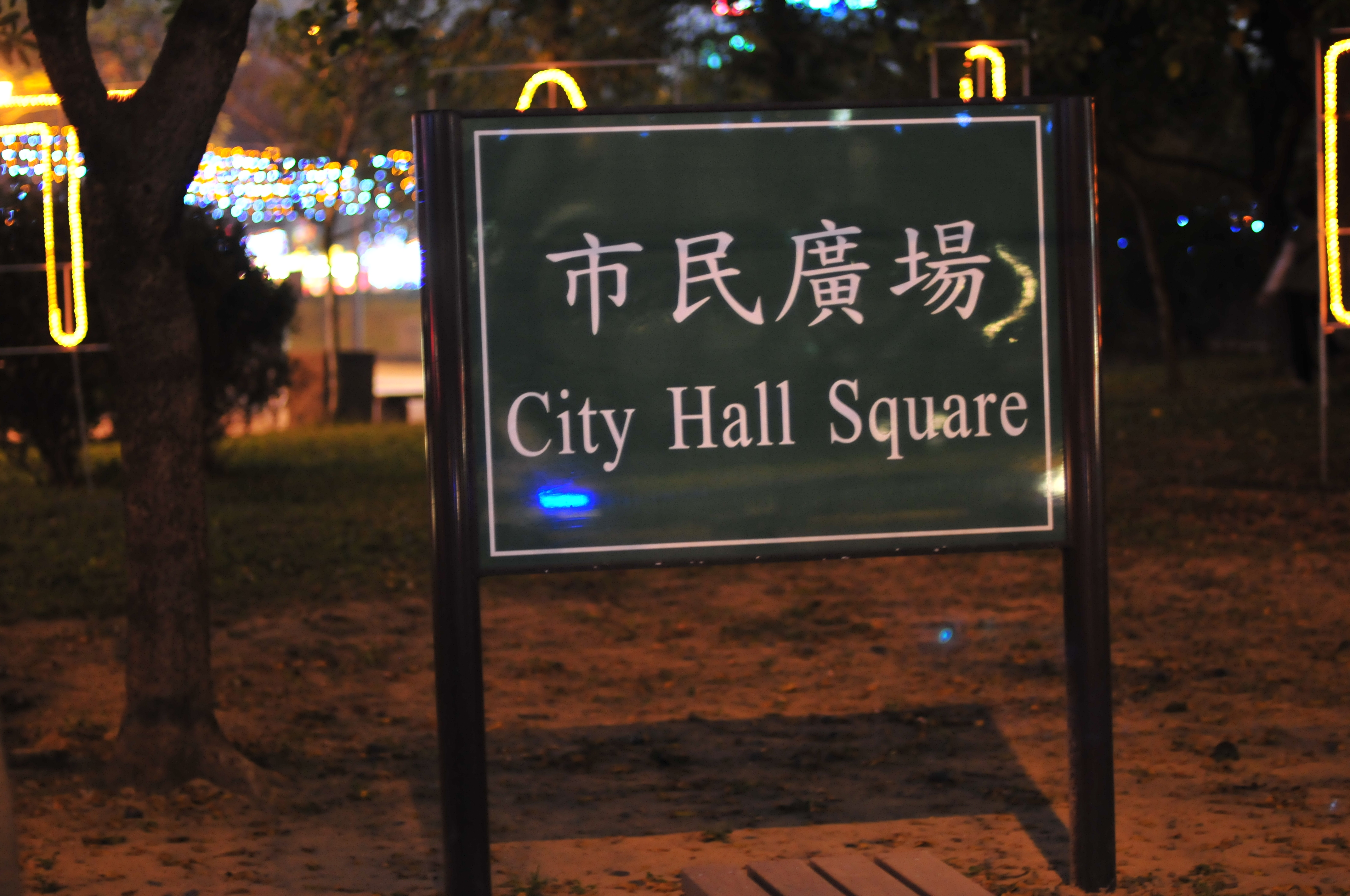 2009臺北燈節，臺北市市民廣場標示牌。